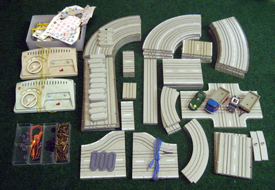 Sammlung von Faller AMS Teilen